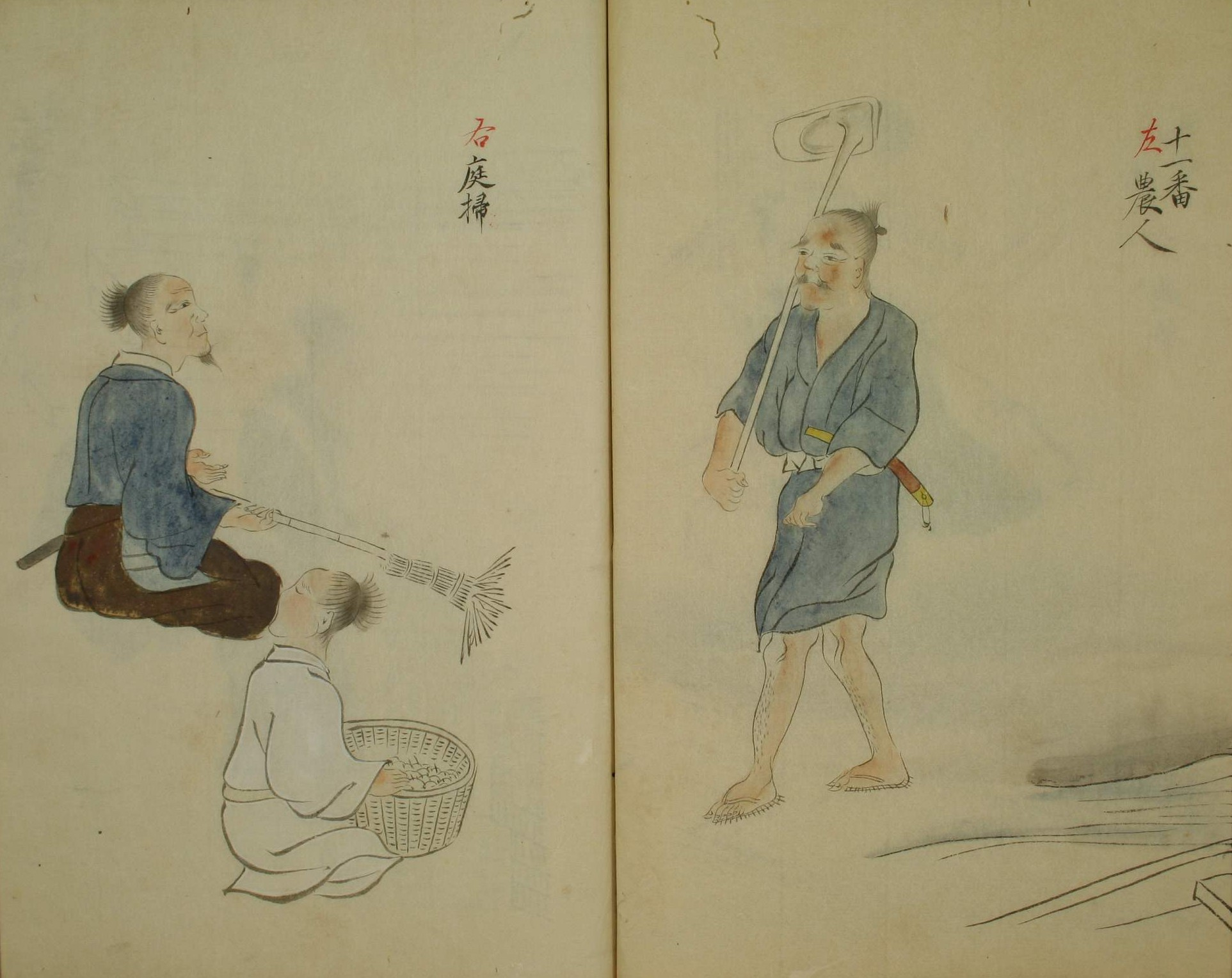 三十二番職人歌合』、垂恵 (?)、1494年、その1838年模写